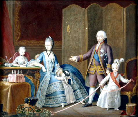 Erzherzogin Maria Amalia und ihr Gemahl Herzog Ferdinand I. von Parma und ihre ältesten Kinder Ludwig, Carolina Maria, Maria Antonia Josepha.